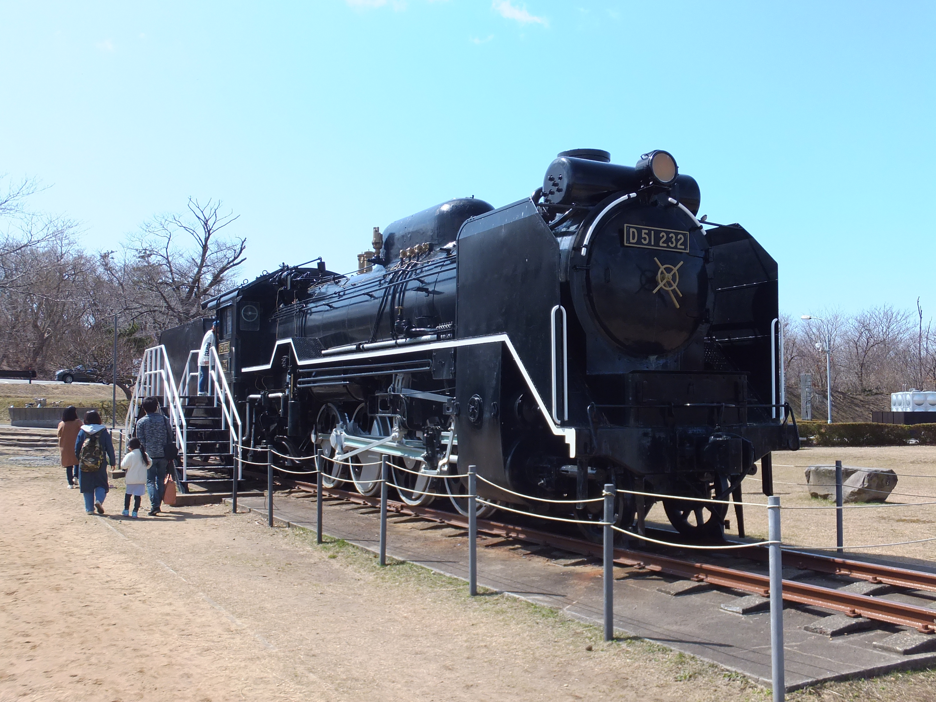 秋田県秋田市、大森山公園内に静態保存されている国鉄D51型蒸気機関車232号機。1938年に地元、土崎工場(現・JR東日本秋田総合車両センター)で製造された第一号の機関車で、その生涯を秋田、青森地区で過ごした生え抜きの一輌である。1971年に秋田市に寄贈され、それ以来同地にて静態保存されている。